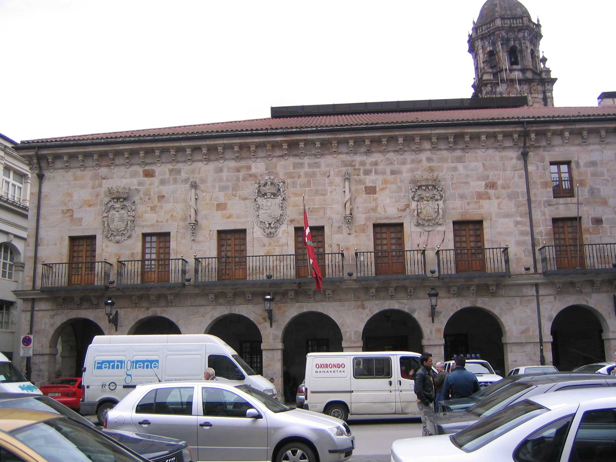 Vista del ayuntamiento de Bergara (Guipuzcoa). Marzo 2006.